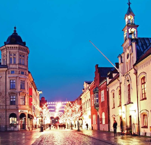 Centrum i Skövde vid Hertig Johans torg